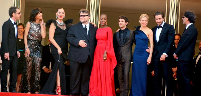 Le jury du festival de Cannes : de gauche à droite, Ethan Coen, Sophie Marceau, Rossy de Palma, Guillermo del Toro, Rokia Traoré, Xavier Dolan, Sienna Miller, Jake Gyllehnaal, Joel Coen.